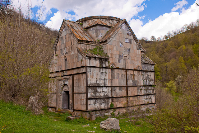 Ջուխտակ Վանք, եկեղեցի